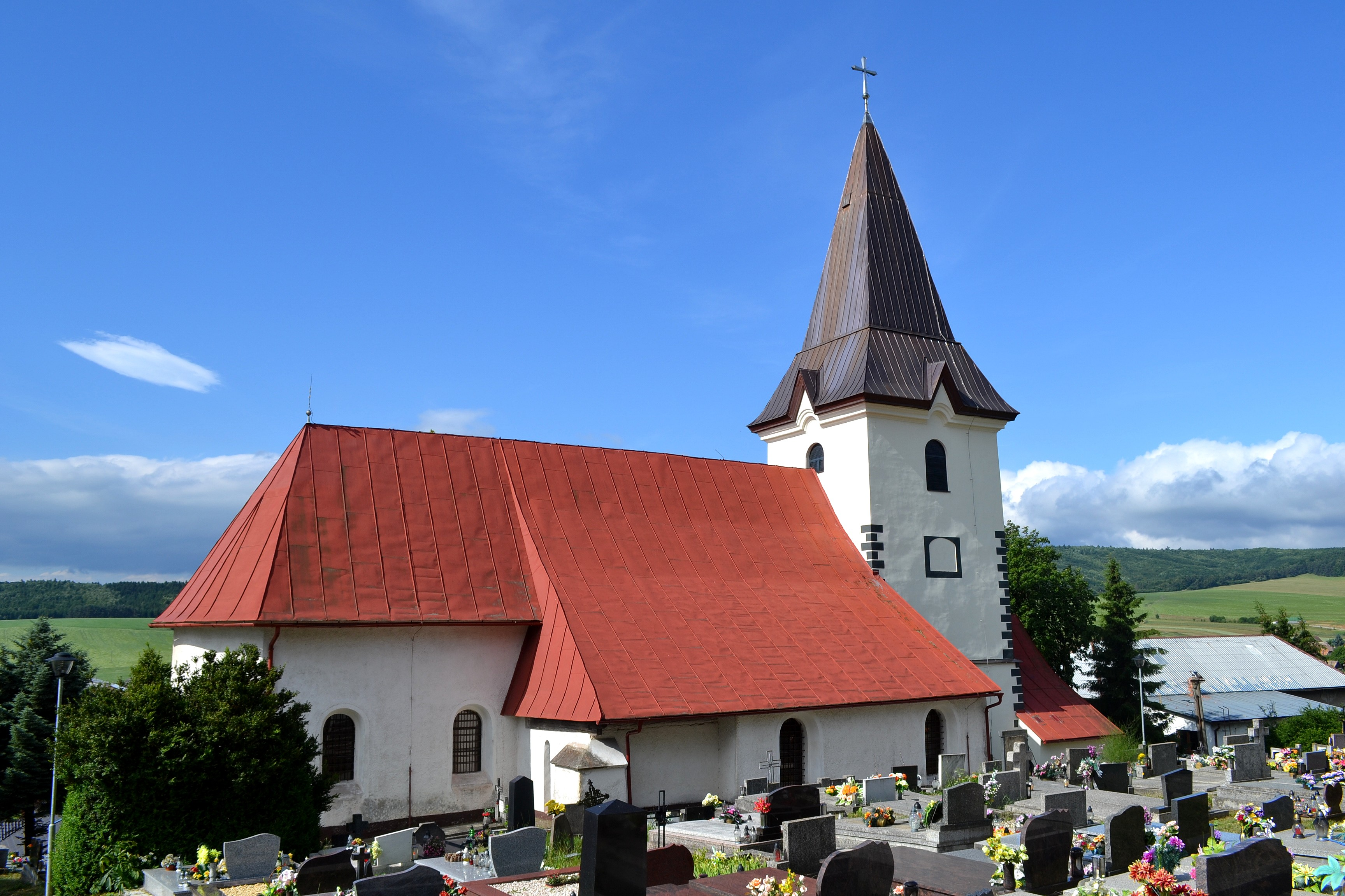 Valča (okr. Martin), Kostol Povýšenia svätého Kríža; pohľad od severu